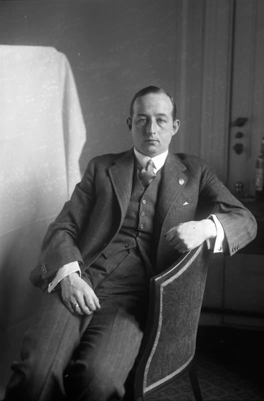 Fürst Starhemberg, der oesterreichische Heimwehrführer, weilt zu Besprechungen mit national Kreisen in Berlin ! Porträt des ehemaligen oesterreichischen Innenministers und Heimwehrführer Fürst Starhemberg.